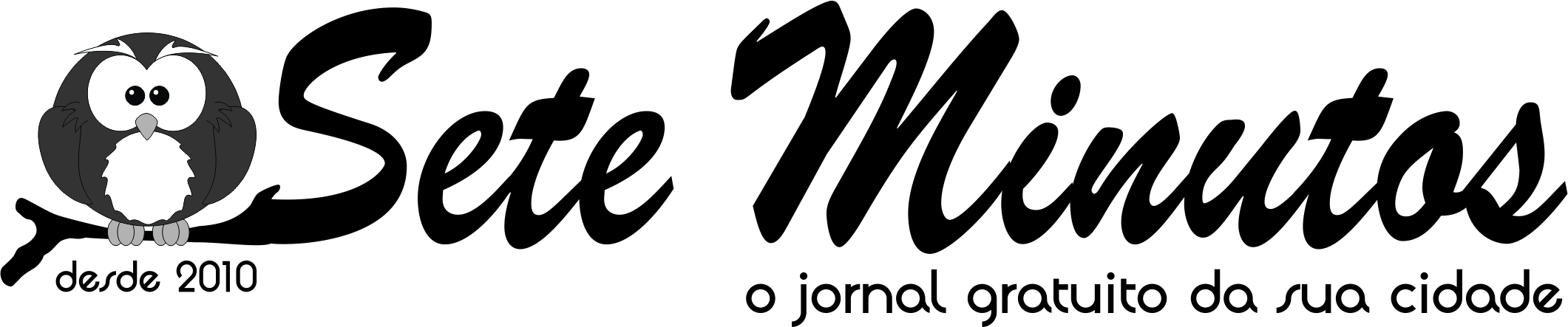 Logotipo utilizado a partir de 23/06/2017